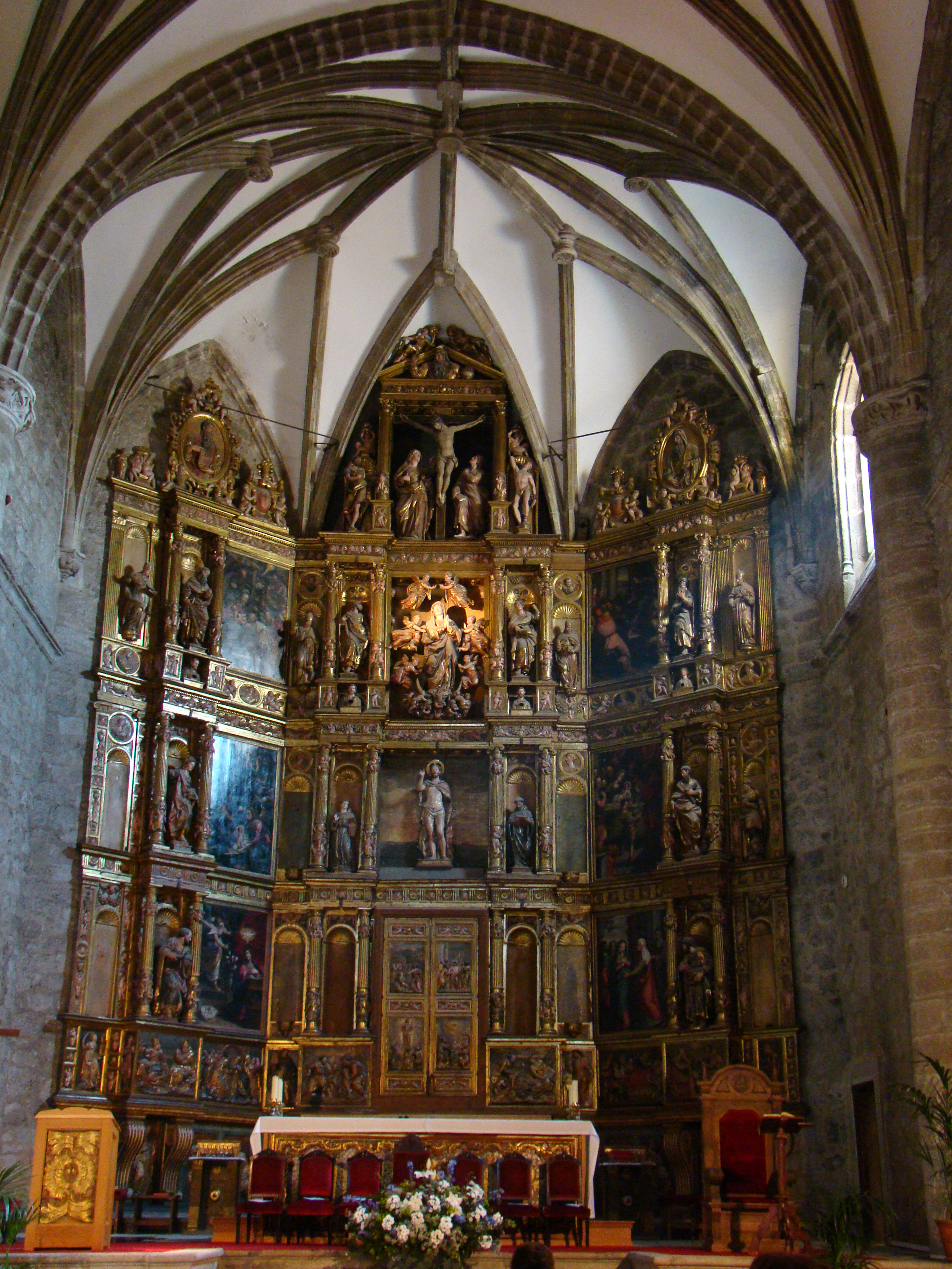 Retablo Mayor de la Basílica de la Asunción de Colmenar Viejo.